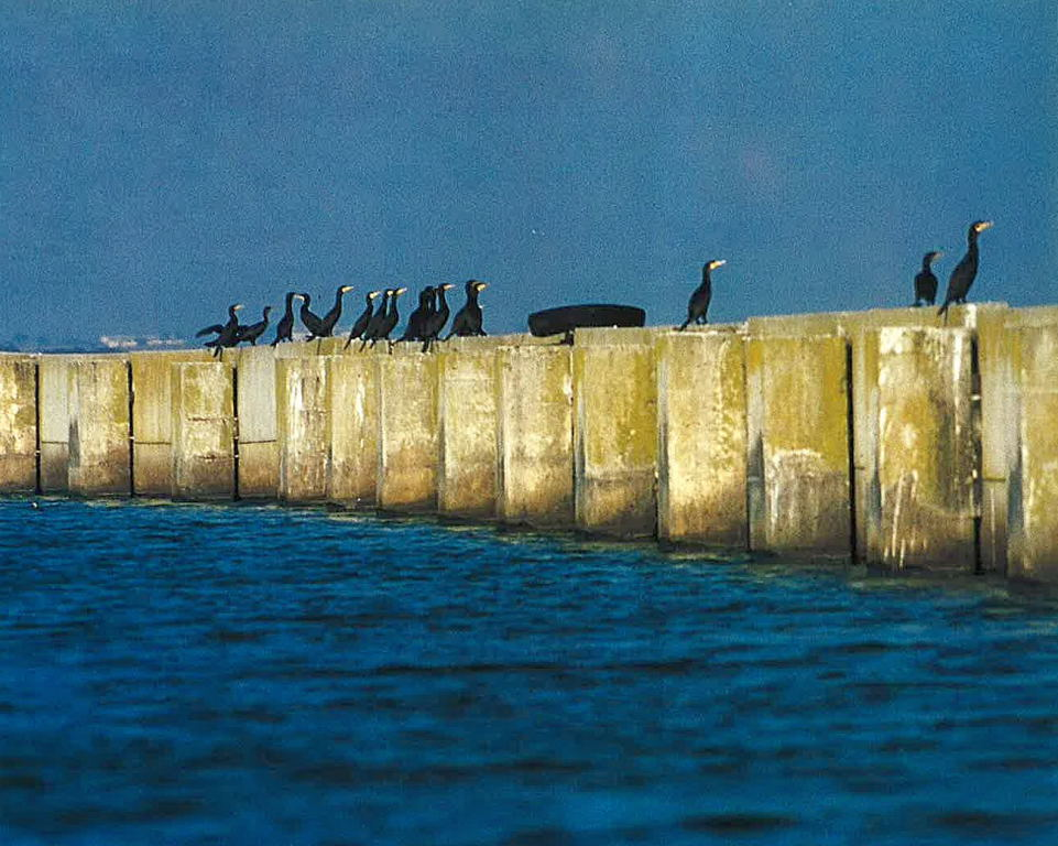 Cormoranes en la pantalla de separación térmica de Arrocampo